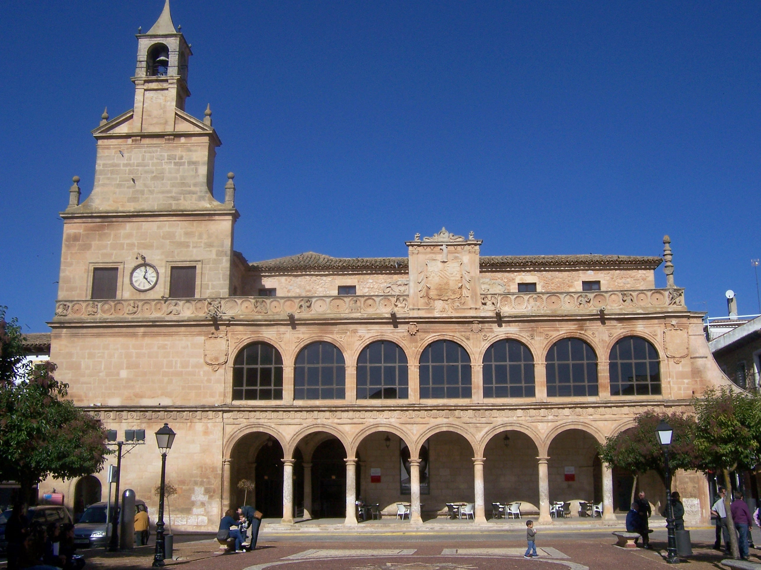 Foto frontal de la Casa Consistorial de San Clemente